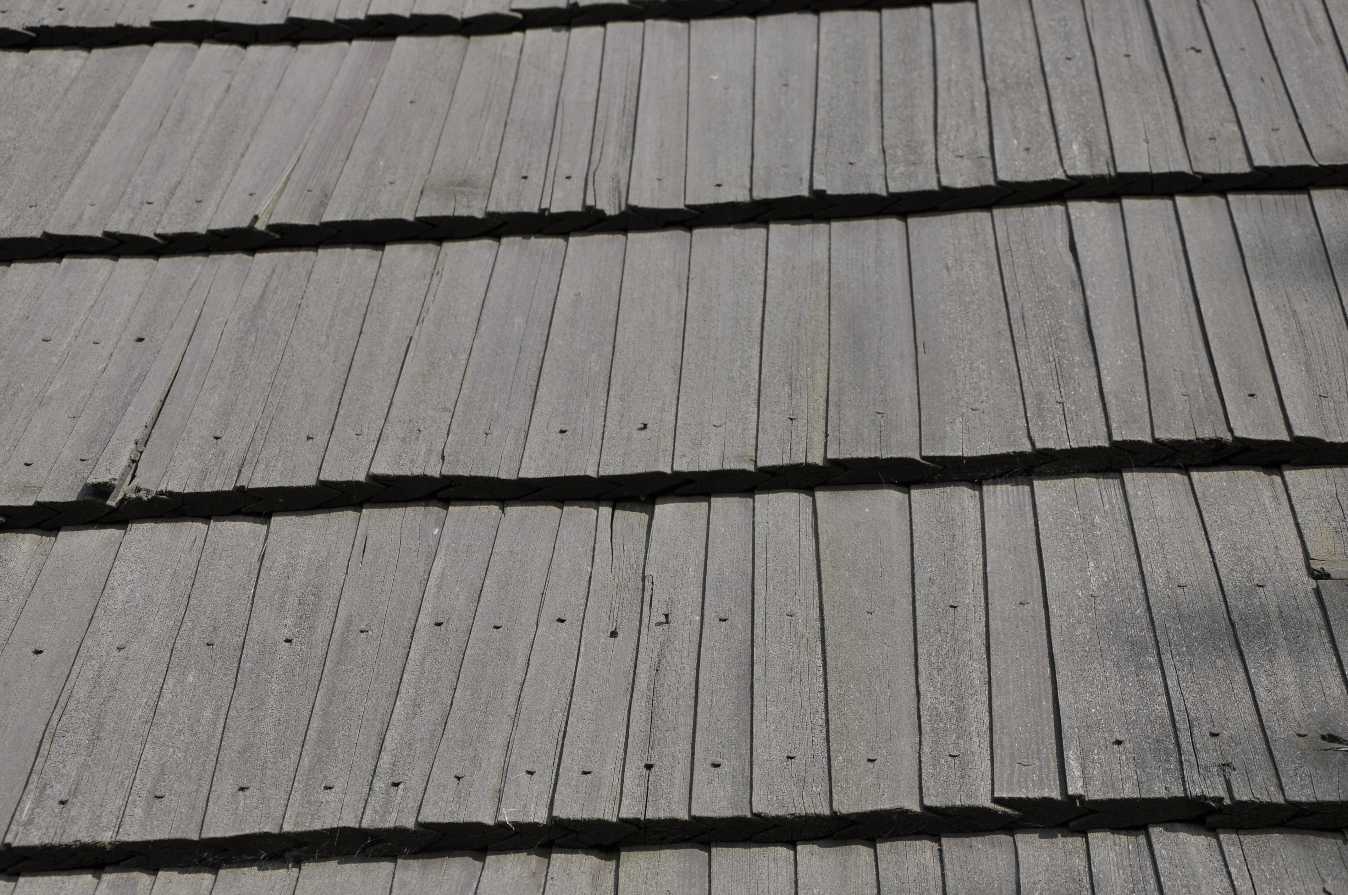 Česky: Veliny, okres Pardubice. Dřevěná zvonice.